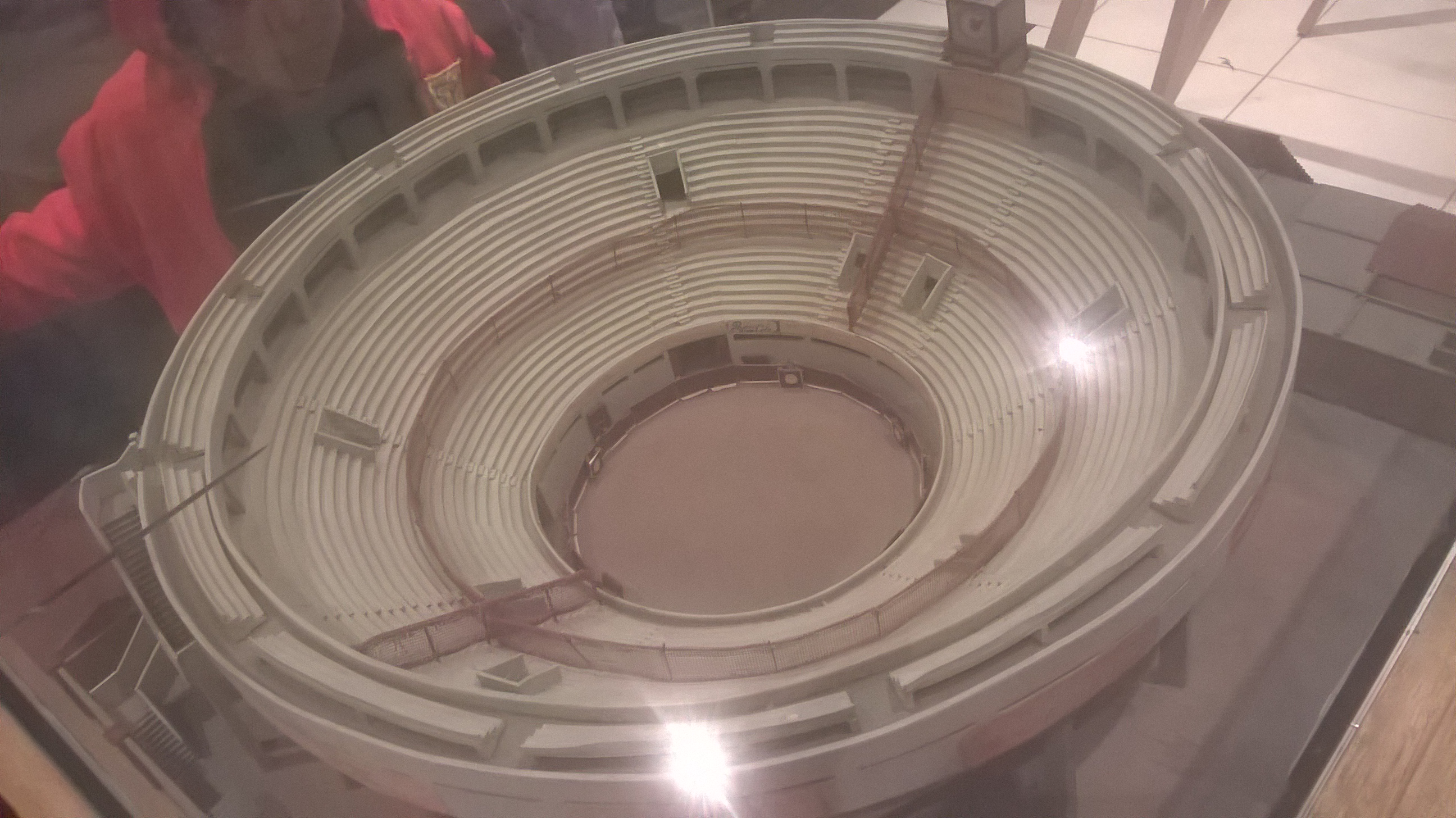 Museo Taurino de Huamantla 1